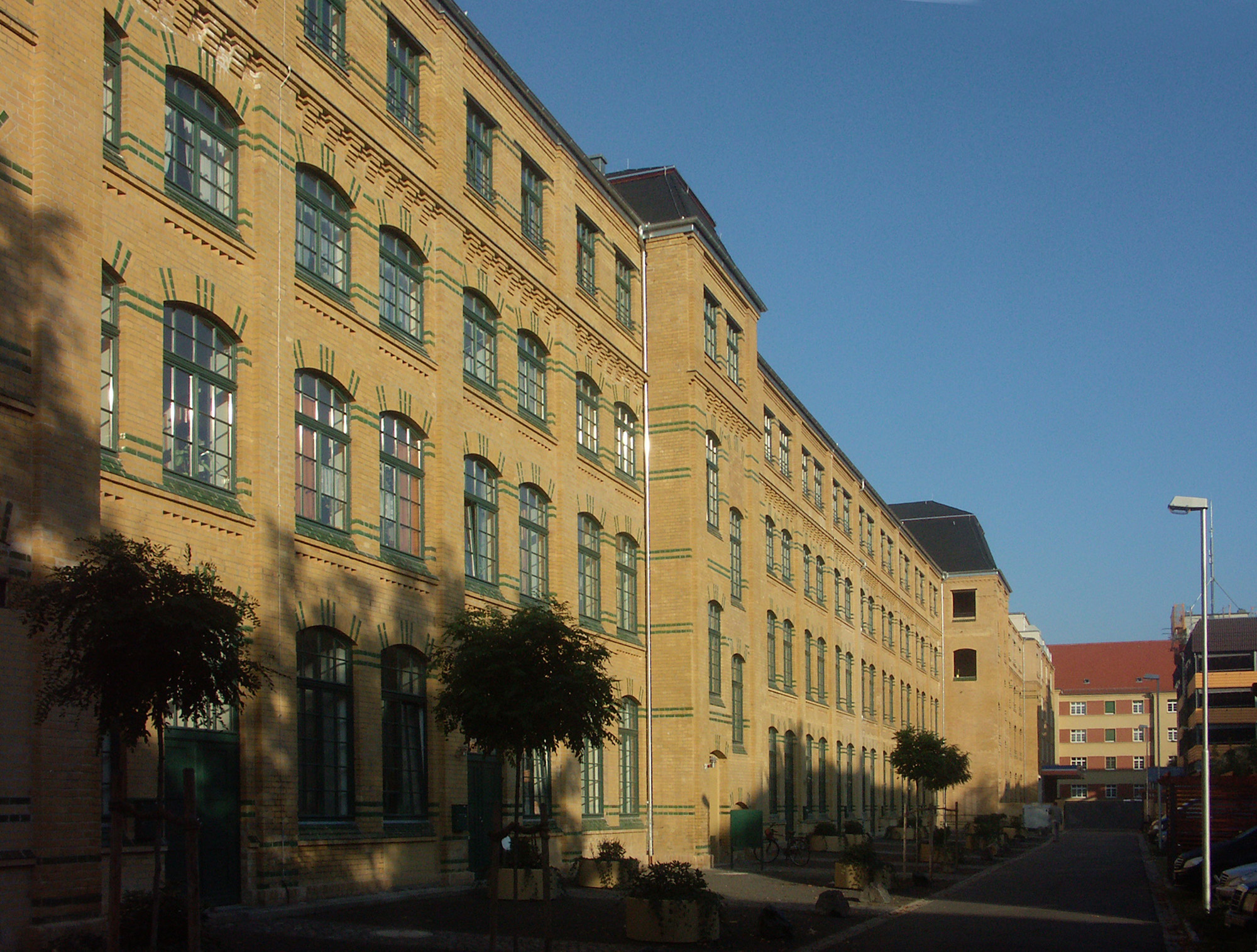 Das Südcenter in Leipzig-Connewitz im ehemaligen Getriebewerk